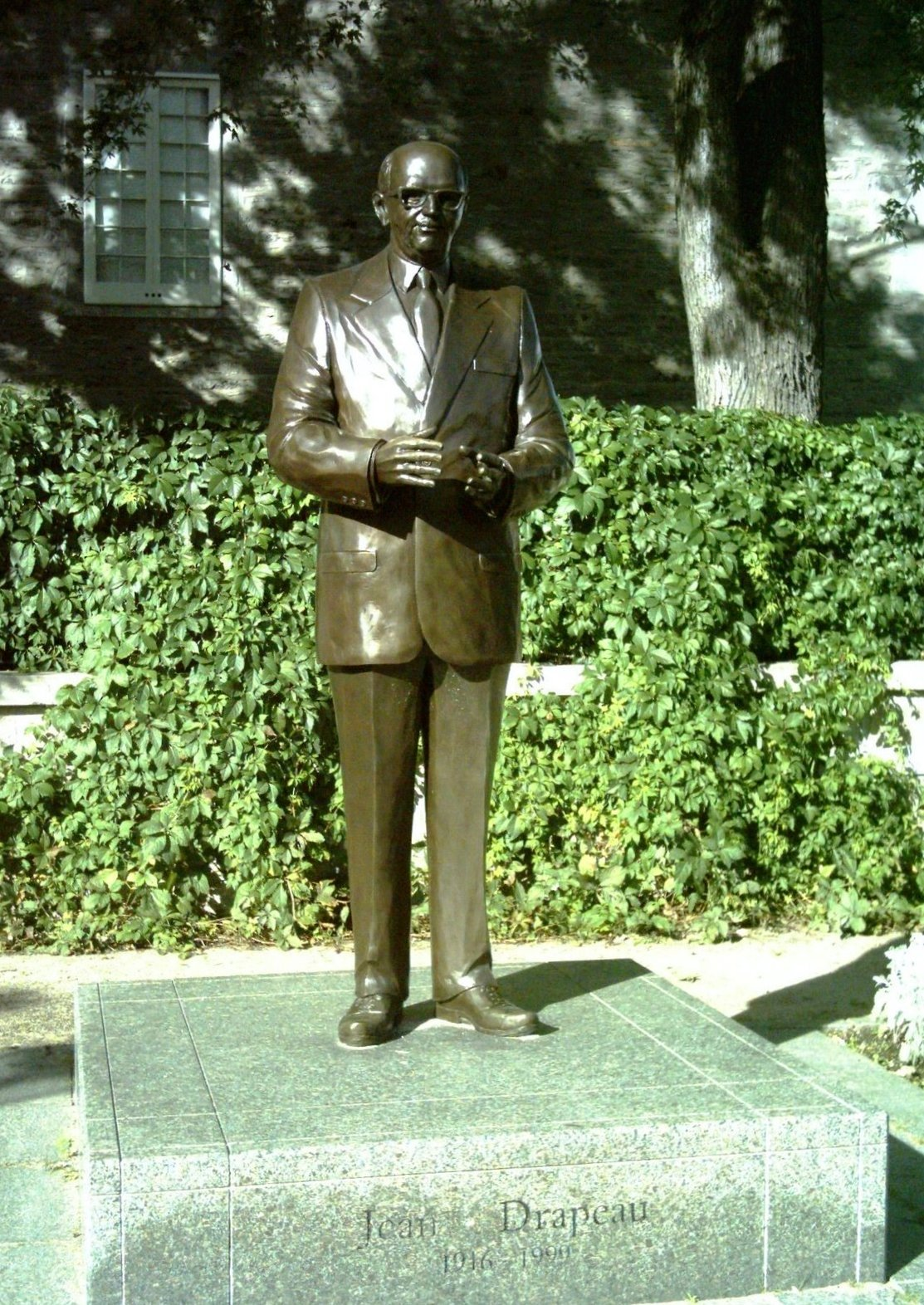 Bronze représentant Jean Drapeau, ancien maire de Montréal, par Annick Bourgeau, situé à la place De La Dauversière à Montréal depuis 2001. Derrière, on aperçoit le Château Ramezay.